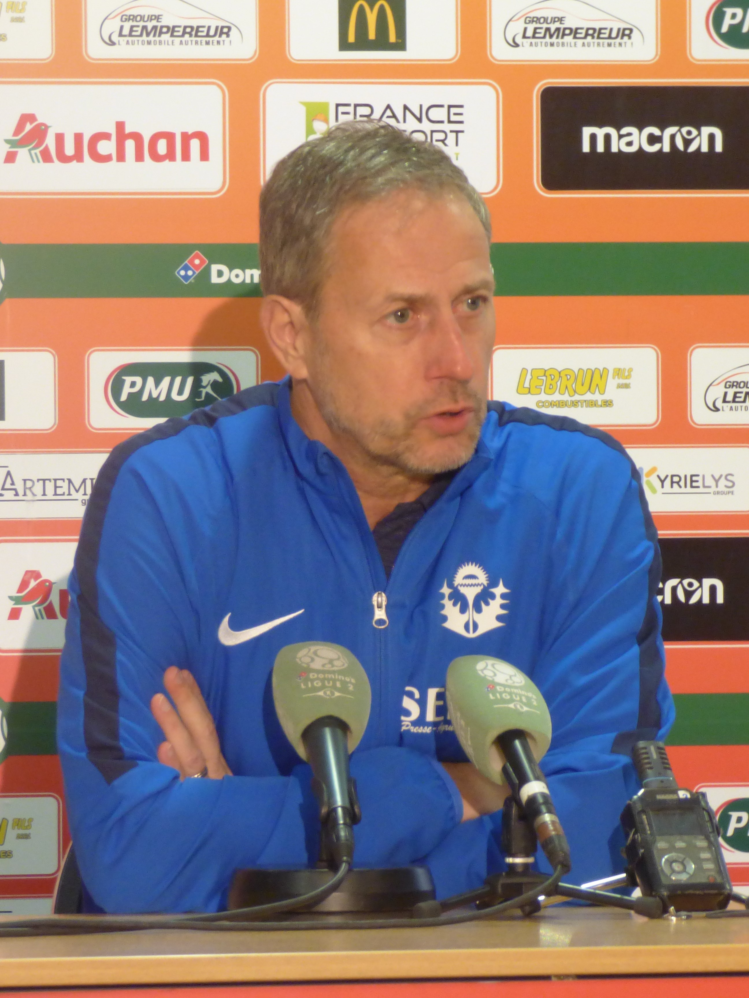 Alain Perrin, lors de la conférence de presse après le match RC Lens / AS Nancy-Lorraine, comptant pour la vingt-et-unième journée du championnat de France de football de Ligue 2 2018-2019, le 19 janvier 2019, au Stade Bollaert-Delelis de Lens.